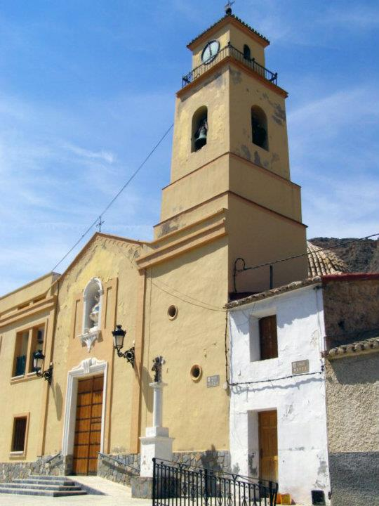 Iglesia parroquial